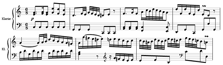 Ausschnitt aus Carl Phillip Emanuel Bachs Klaviersonate f-Moll